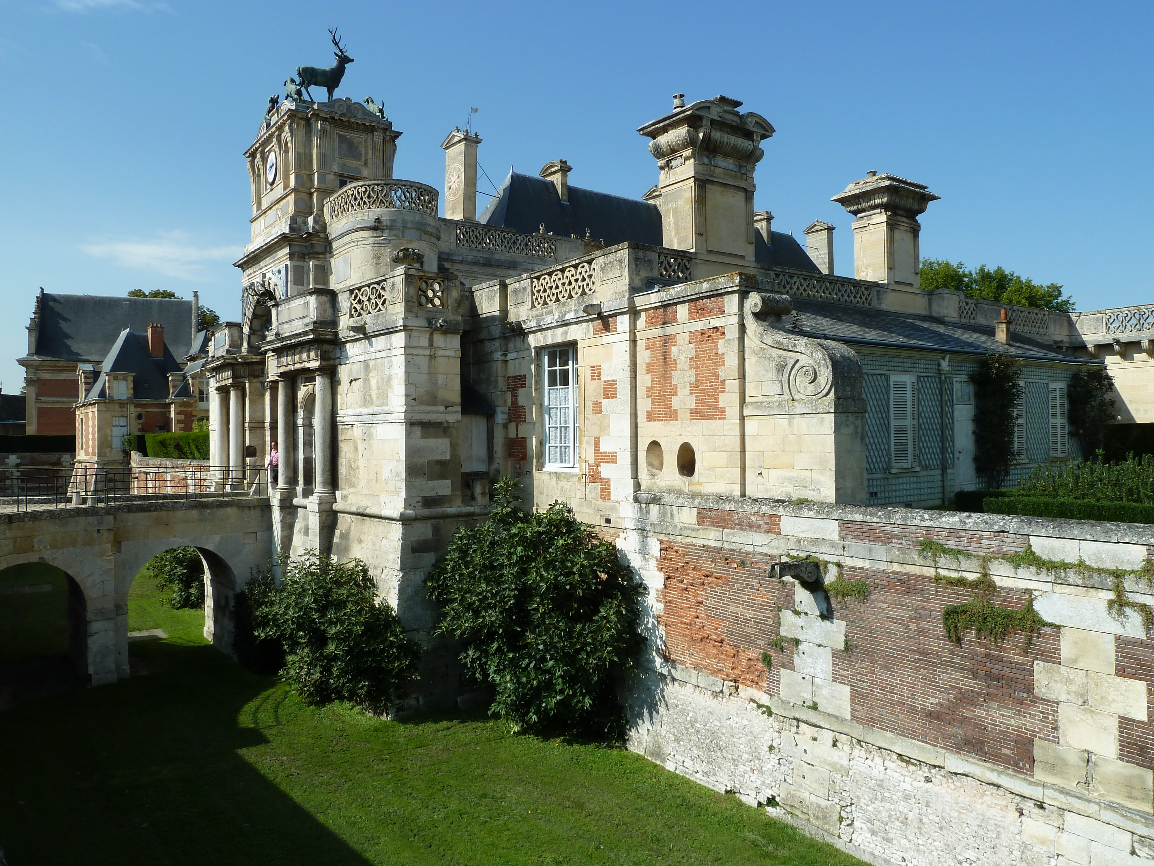 Château d'Anet - Anet - Eure-et-Loir - France - Mérimée PA00096955 .